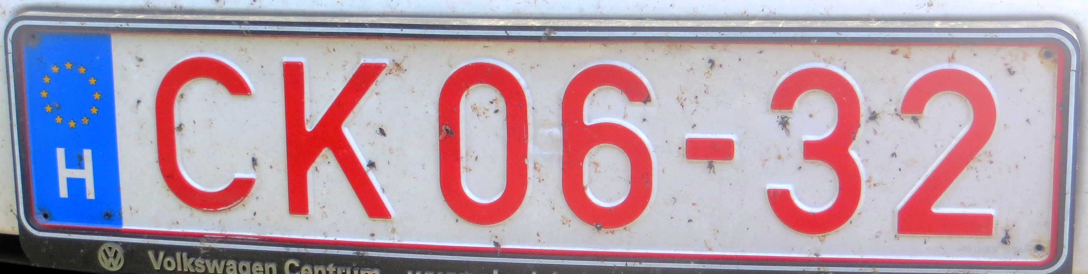 Hongaars EU kentekenplaat voor langzame voertuigen